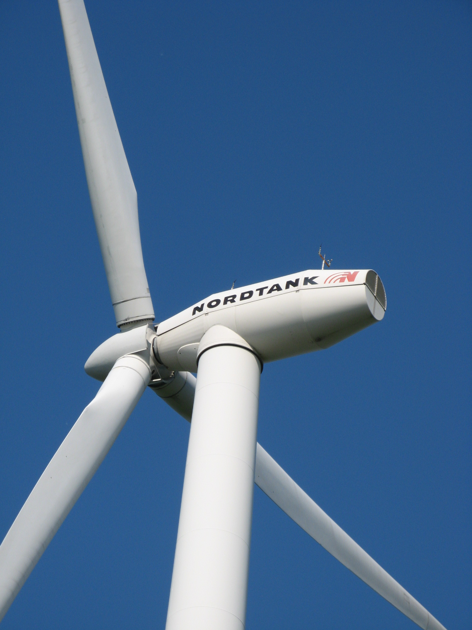 wind energy generator nordtank